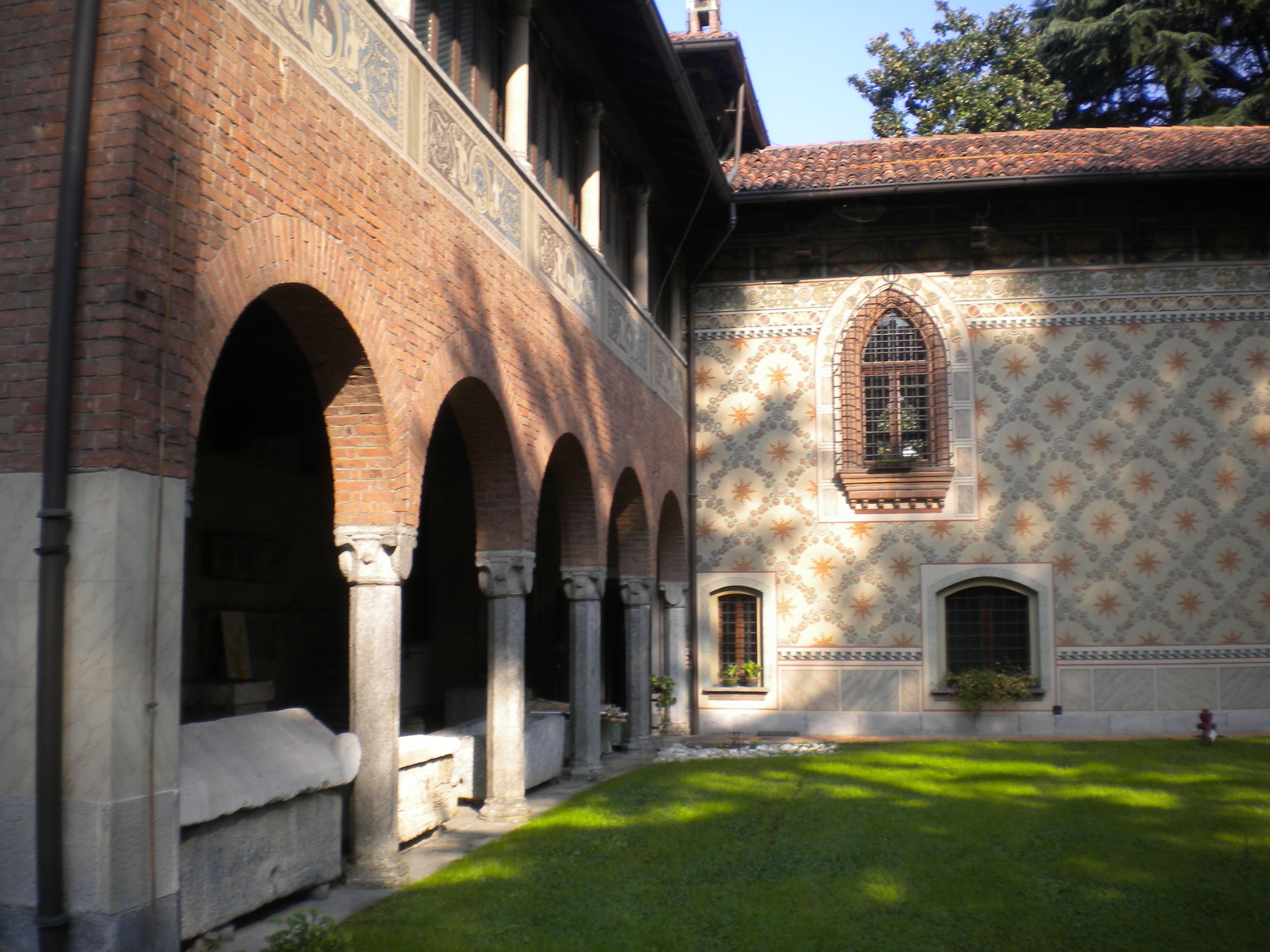 Museo Civico "Guido Sutermeister" This is a photo of a monument which is part of cultural heritage of Italy.